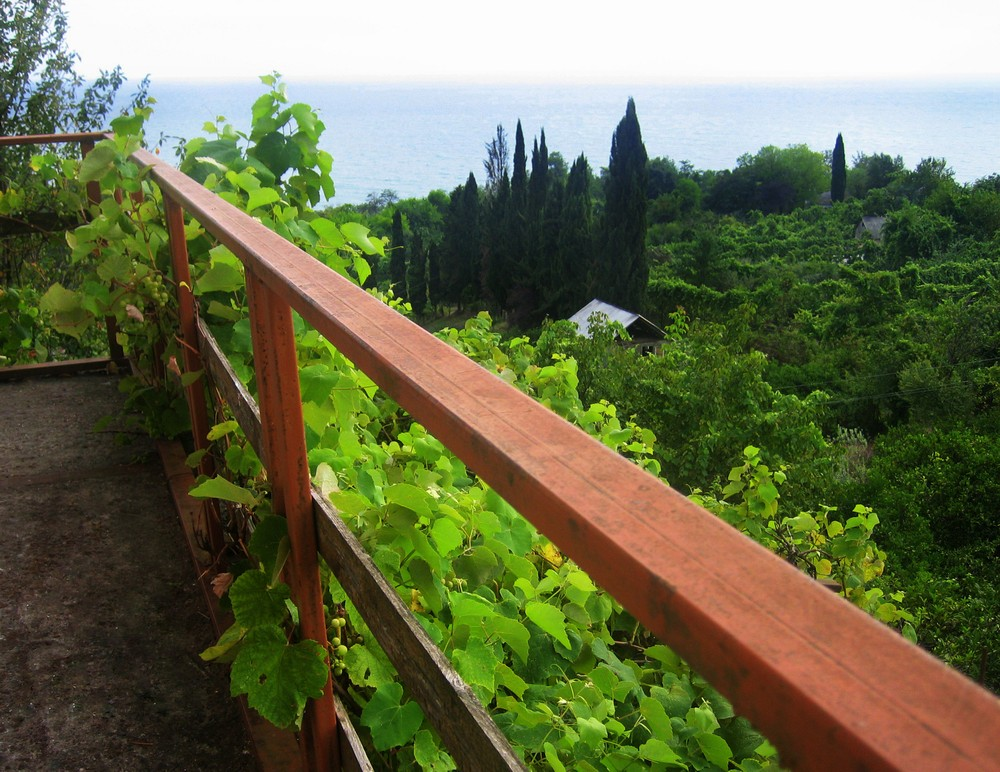 Эшеры, Абхазия. Вид на море.